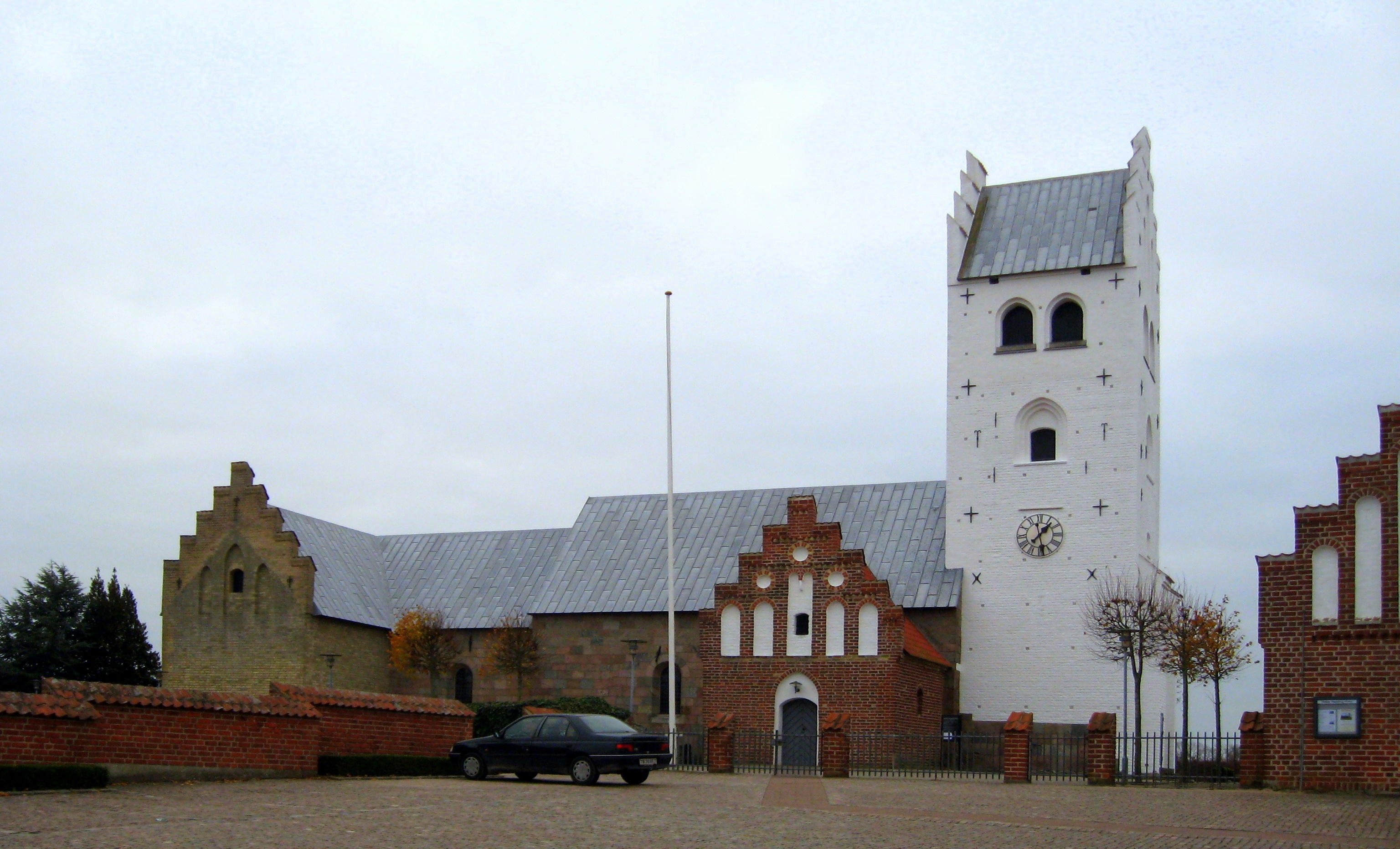 Vester Hassing Kirke beliggende i Vester Hassing i Vester Hassing Sogn i Aalborg Stift.